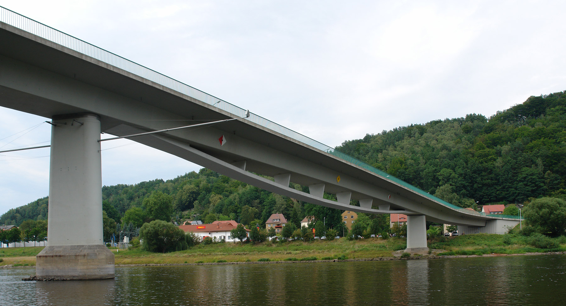 Straßenbrücke Bad Schandau